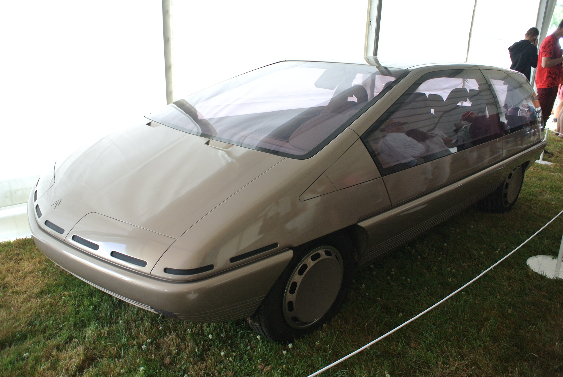 Prototype Citroën Xenia présenté au rassemblement du centenaire en juillet 2019 à La Ferté Vidame